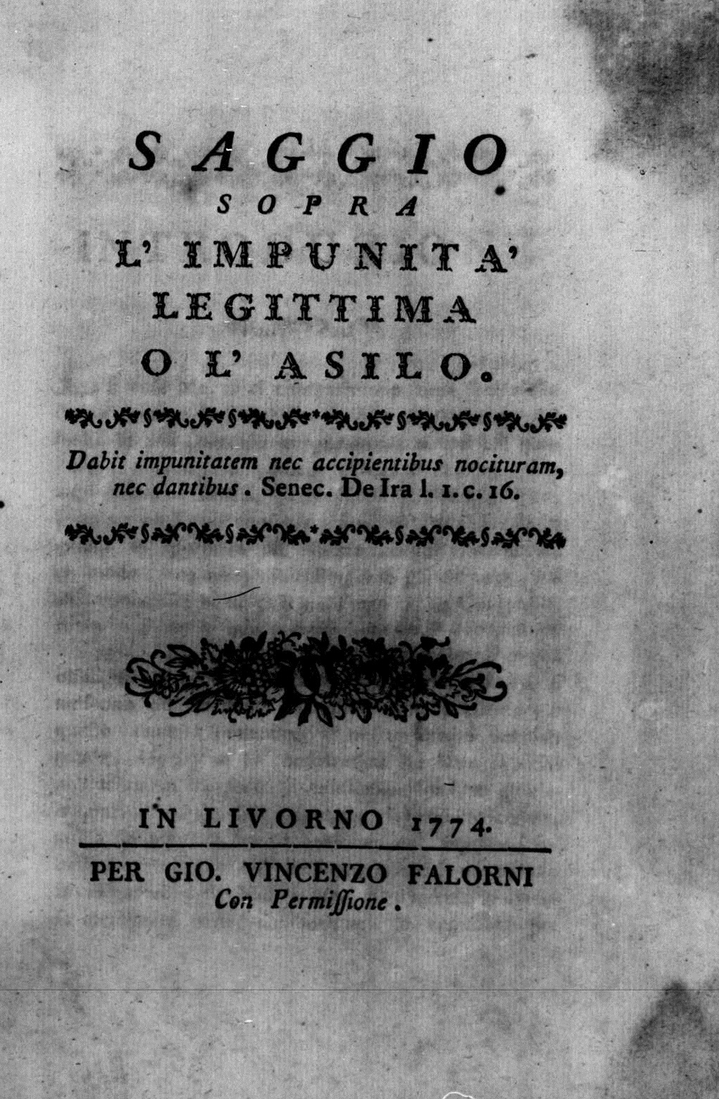 Frontespizio